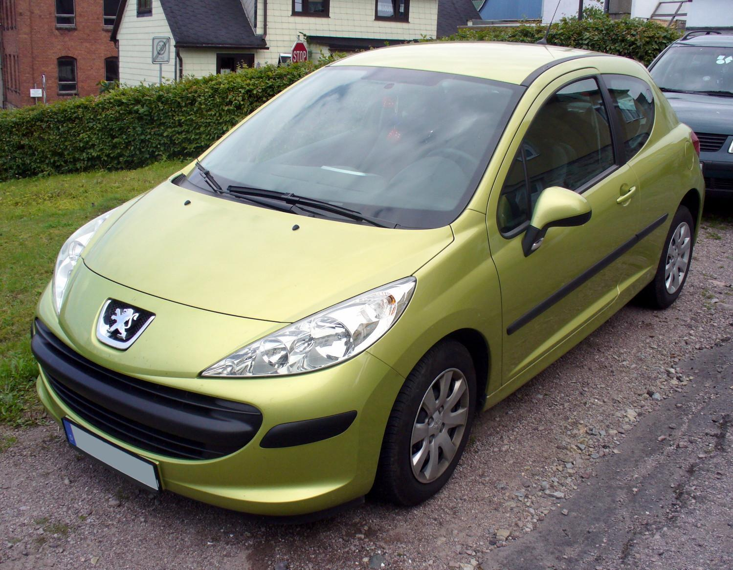 Peugeot 207